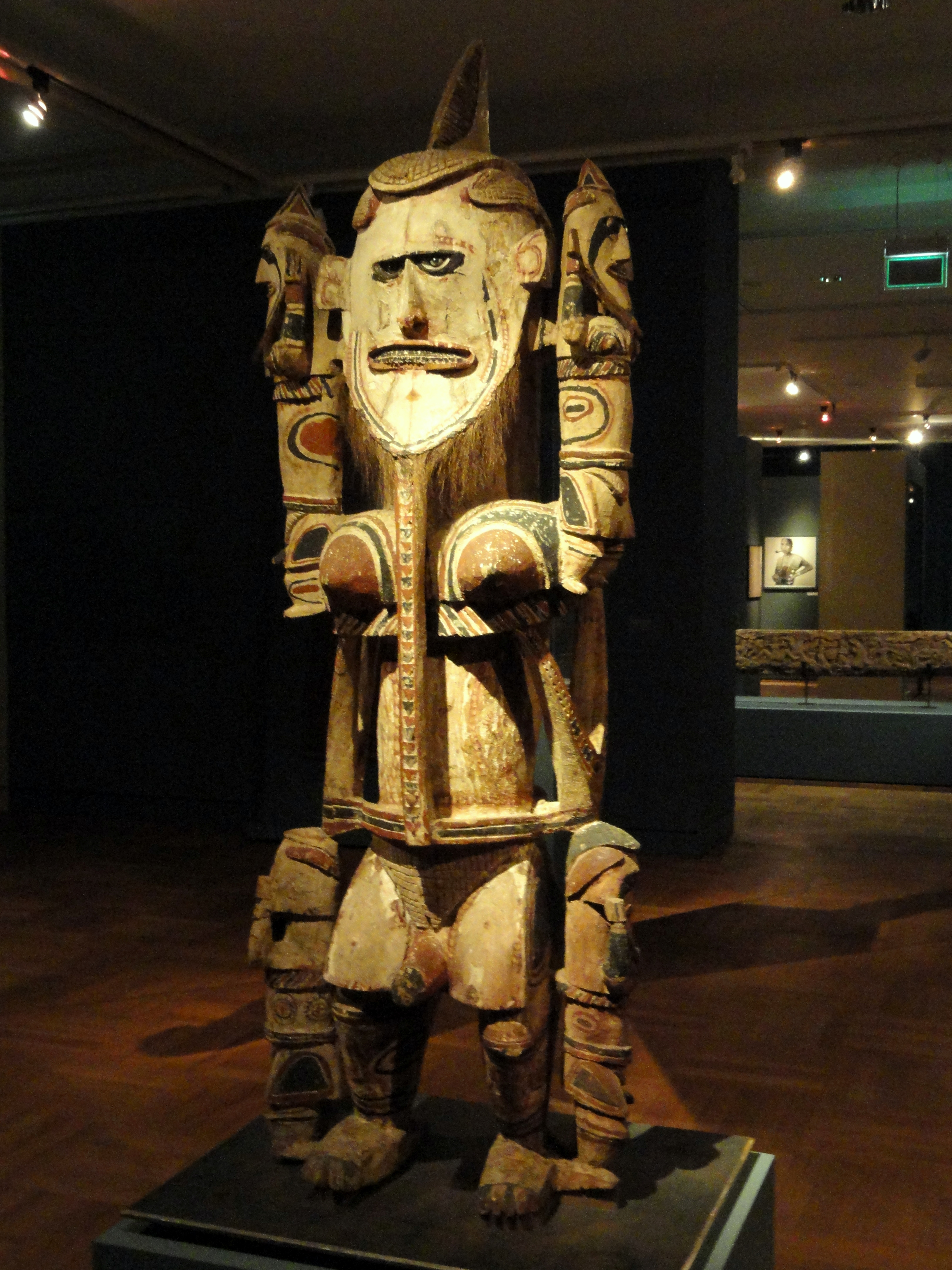 Exhibit from the 'Kunst der Welt' gallery of the Staatliches Museum für Völkerkunde München, Maximilianstraße 42, Munich, Germany. Figure of Uli, New Ireland Island, c. 1913.